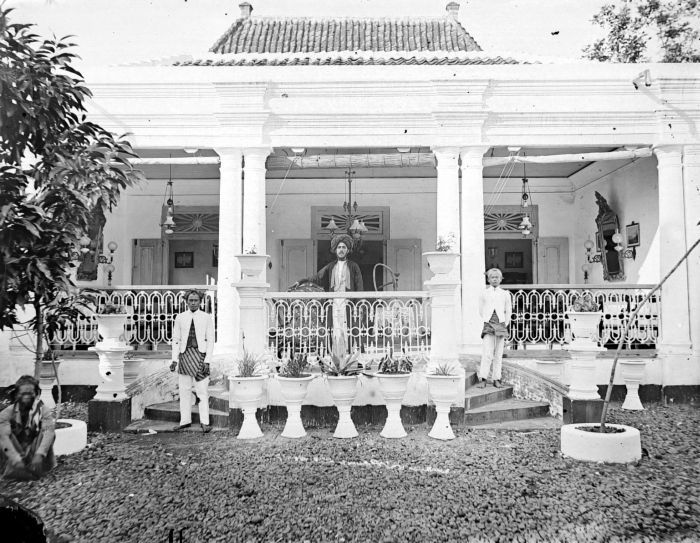 Negatief. Huis van een Arabisch hoofd, Pekalongan, Oost-Java